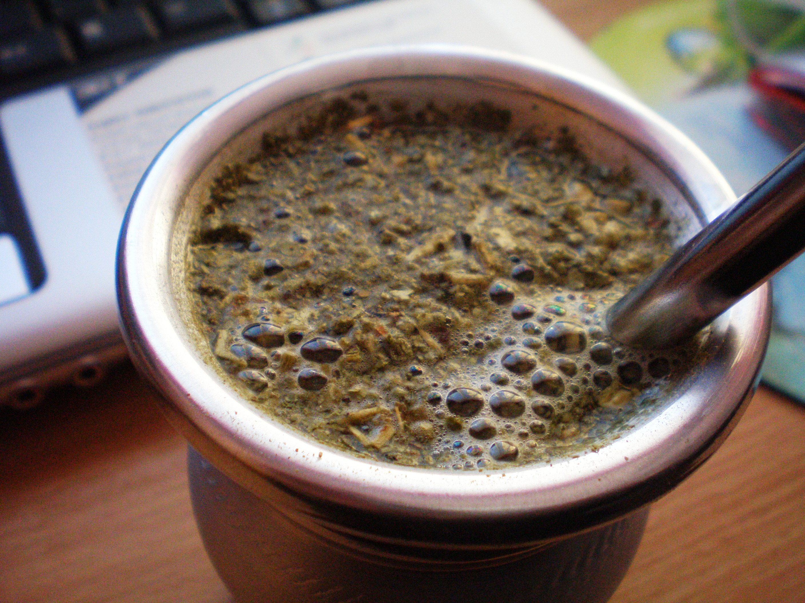 Avañe'ẽ: Mate